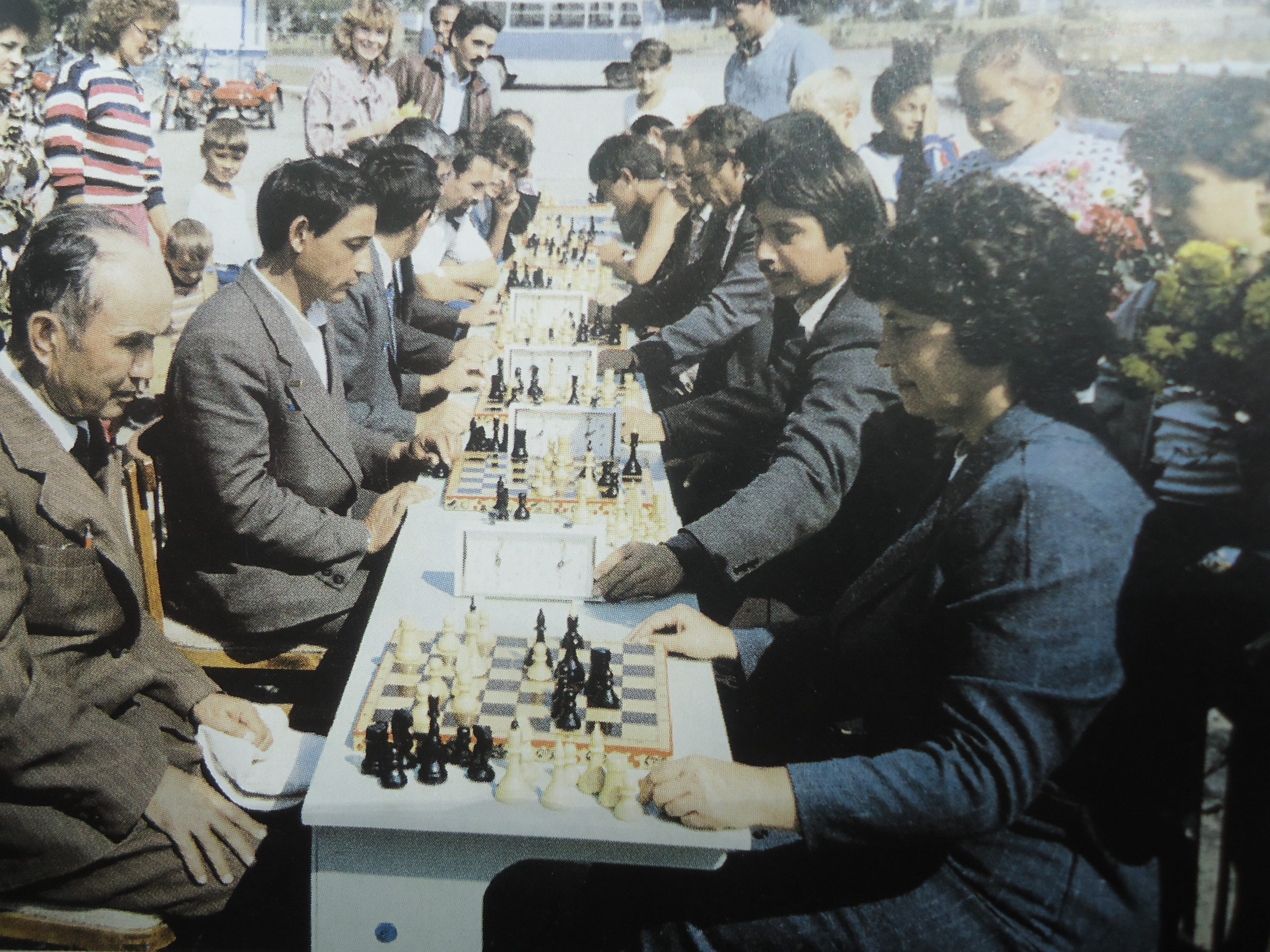 Башҡортса: Уҡытыусы, тыуған яҡты өйрәнеүсе Хөсәйенов Ирек Әбделхәй улы шахмат туйынса турнирҙа.